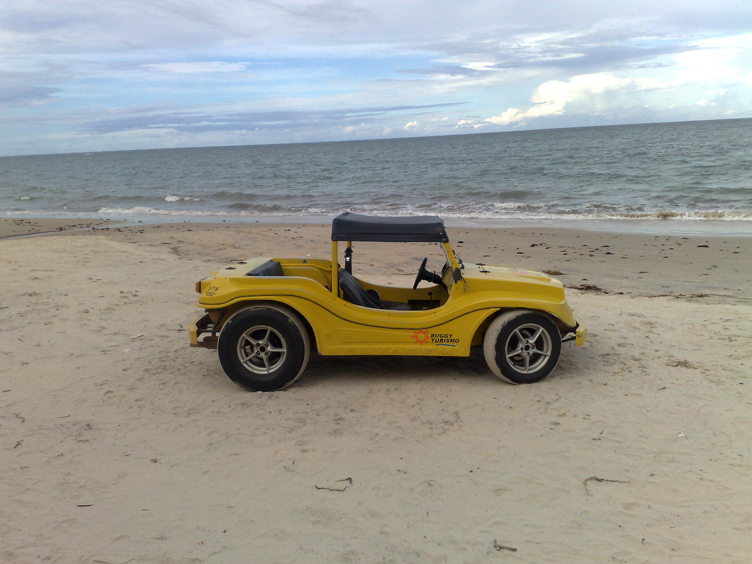 Buggy em Jacumã - Rio Grande do Norte / Brasil.